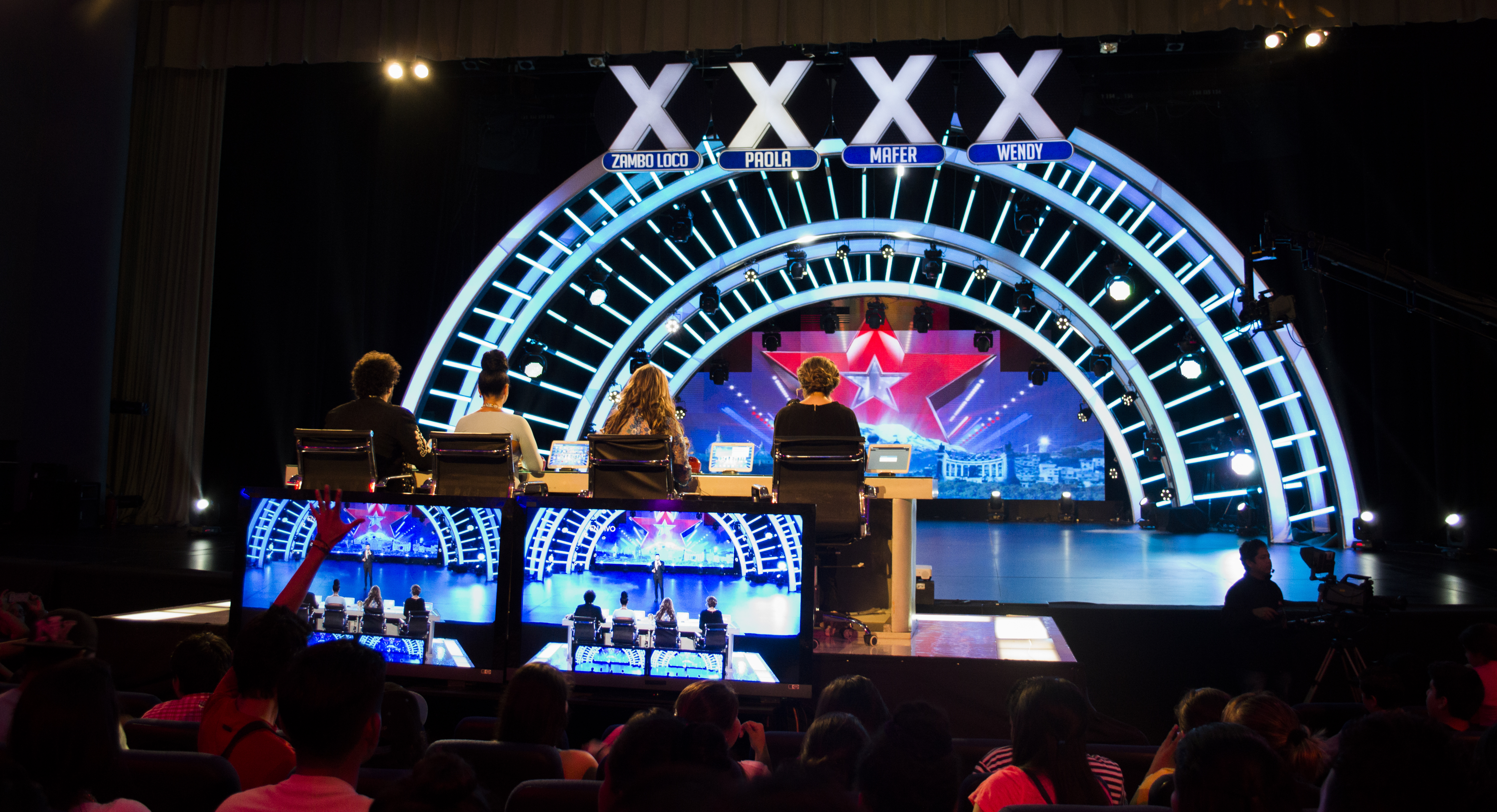 Ecuador Tiene Talento 3 el 26 de octubre de 2014.